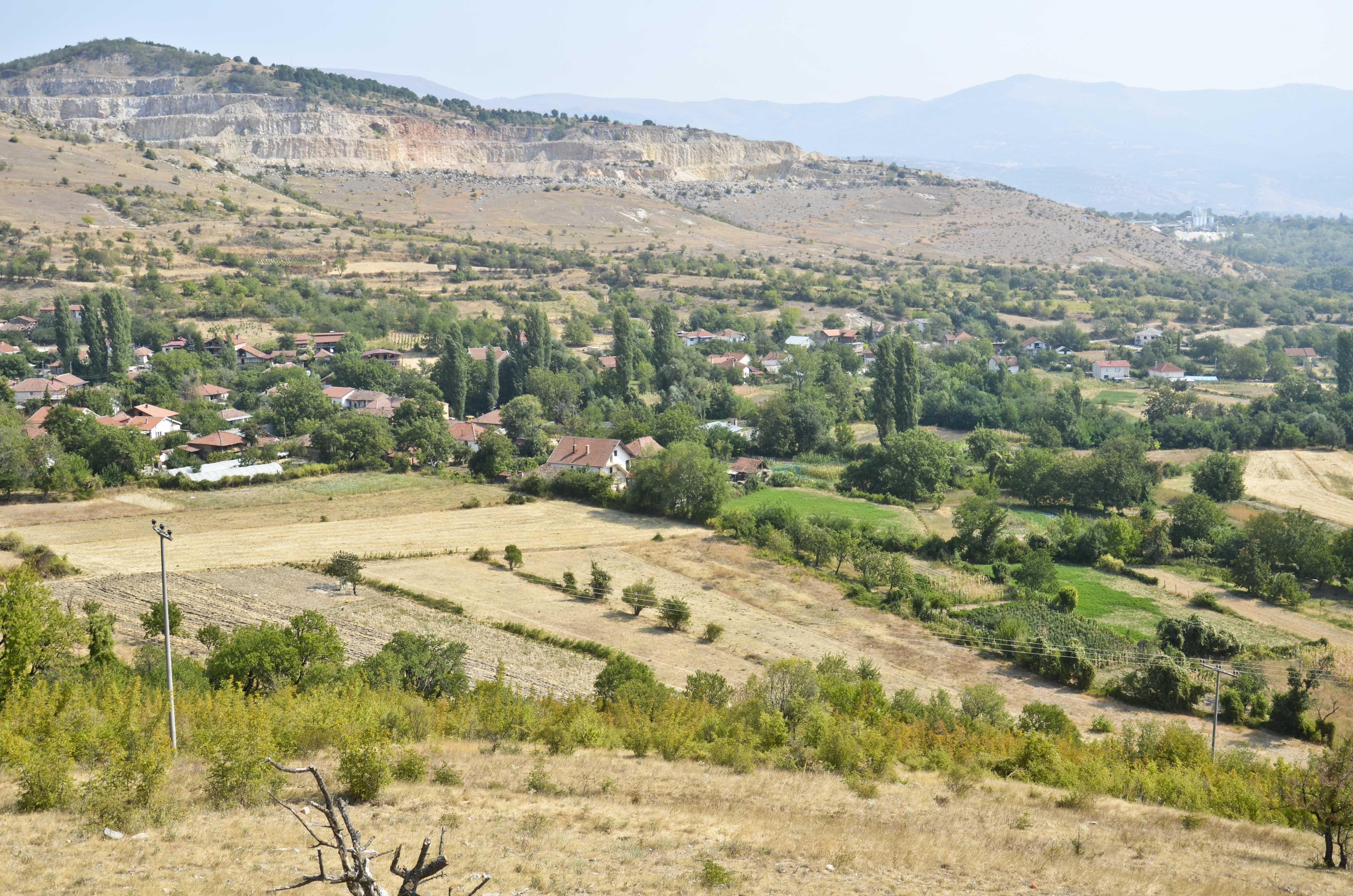 Село Бањани, скопско